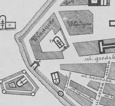 Дільниця Владиче в Перемишлі. Фрагмент мапи міста. 1. Львівська брама. 13. Вежа римарів. 20. Собор святого Івана Хрестителя. 26. Костел святого Роха з шпиталем. 30. Костел і монастир реформатів. 31. Церква Пресвятої Трійці.